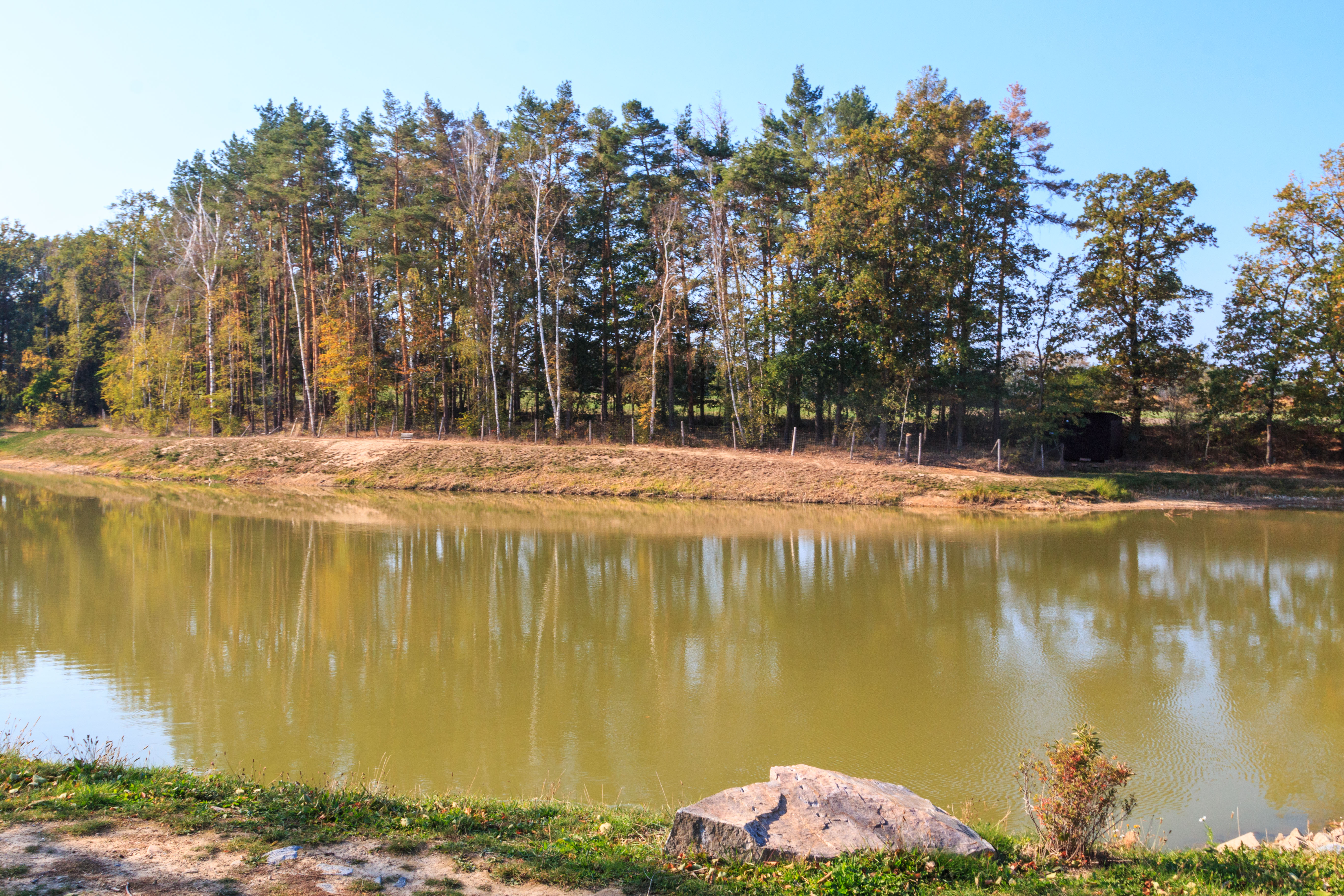 Rybník Bítovánky Project: Vodstvo Ticket: 1617.